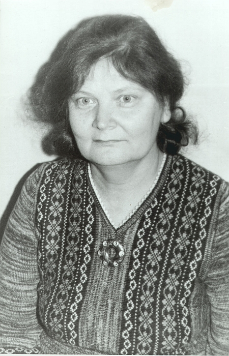 Неонила Артёмовна Криничная (род. 1938) — российский фольклорист, доктор филологических наук